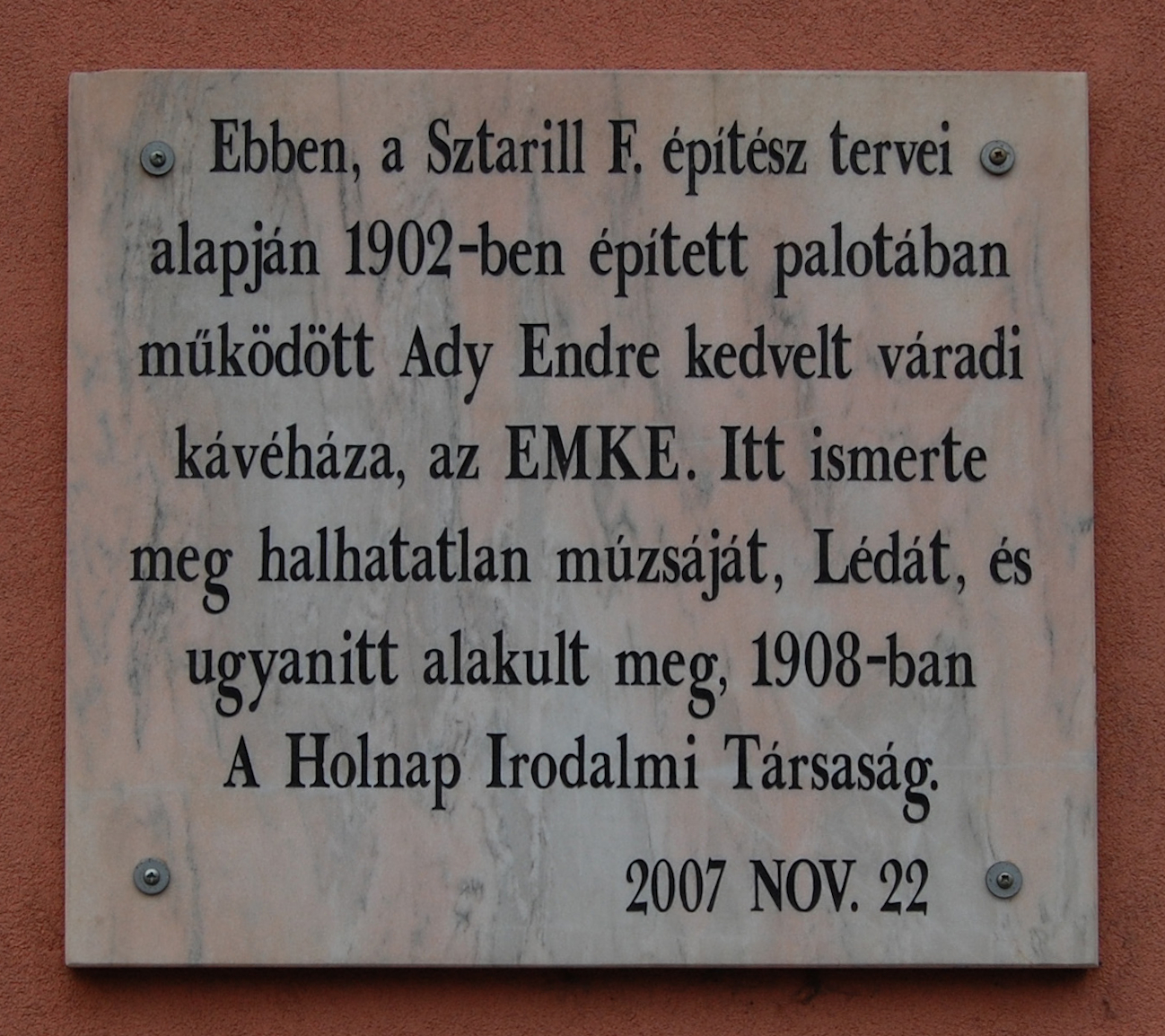 Ady-emléktábla az egykori EMKE kávéház falán, Nagyváradon, a Színház téren (Erdély, Románia)